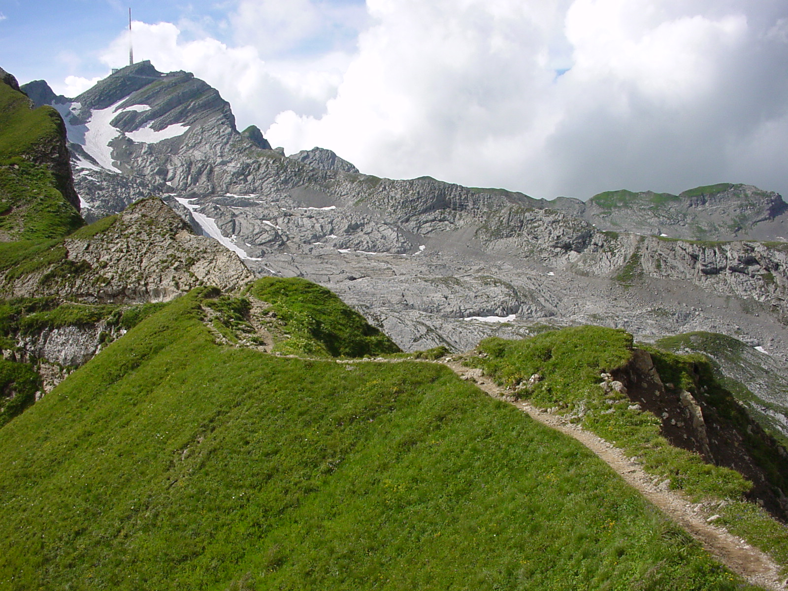 Alpstein, vom Rotsteinpass